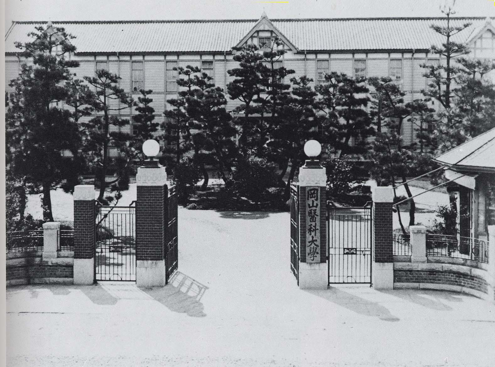 岡山医科大学正門（岡山大学医学部の前身）